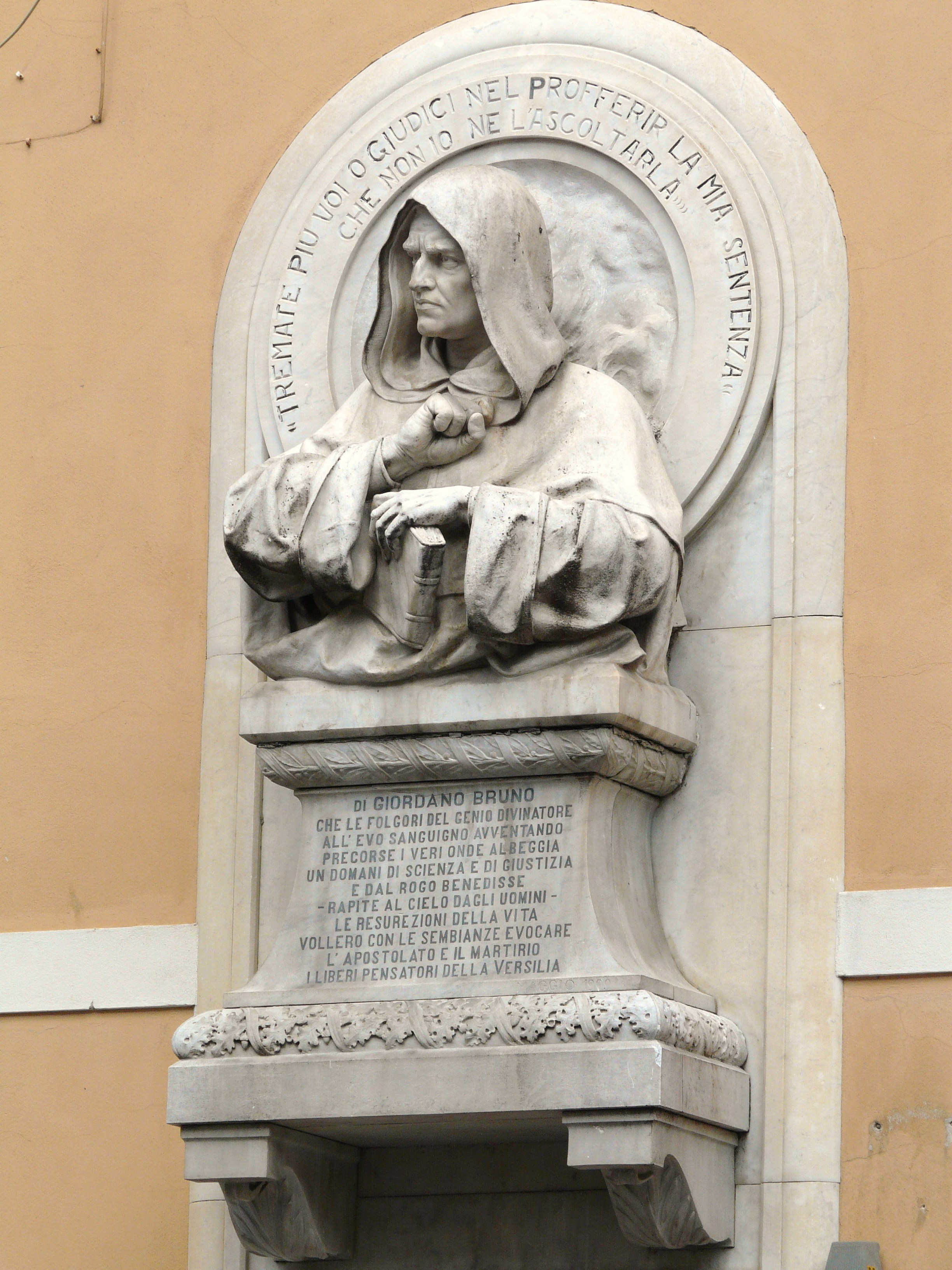 Monumento a Giordano Bruno, Pietrasanta, Toscana, Italia